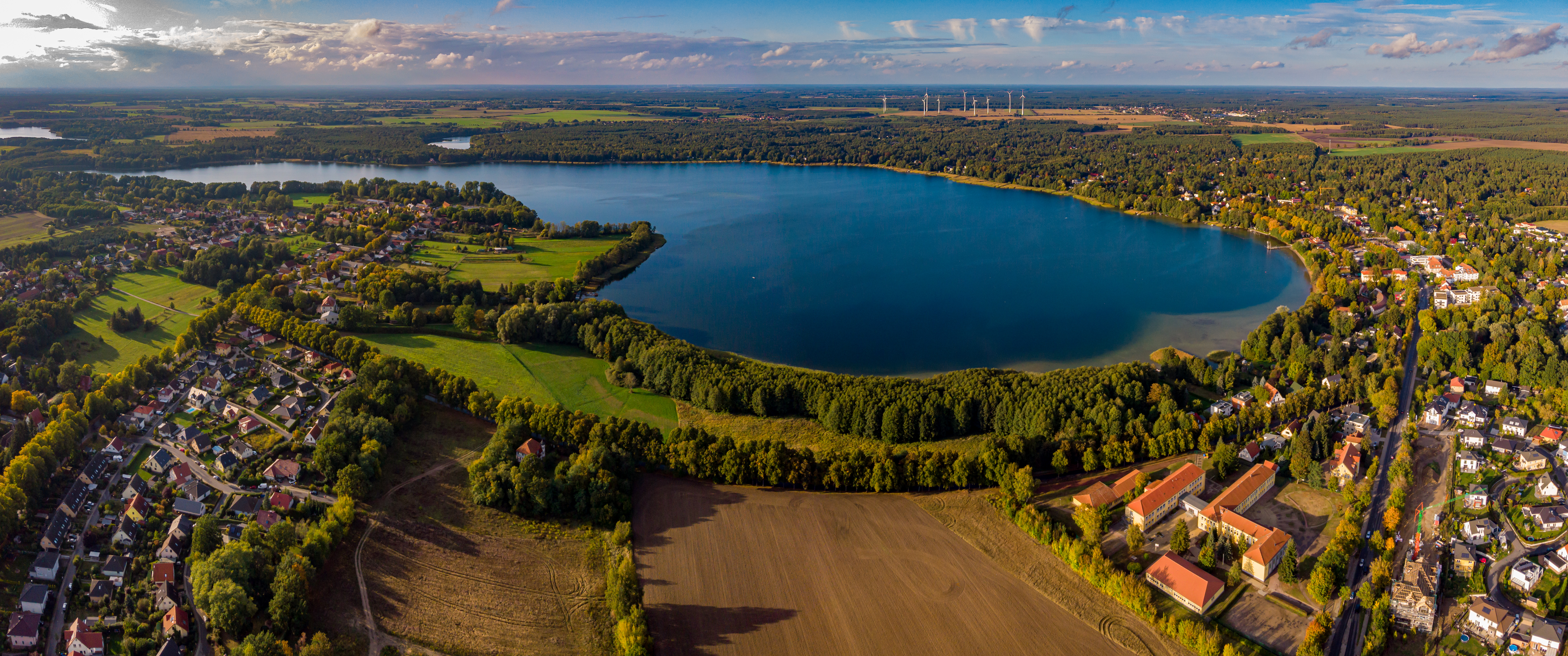 Wandlitz